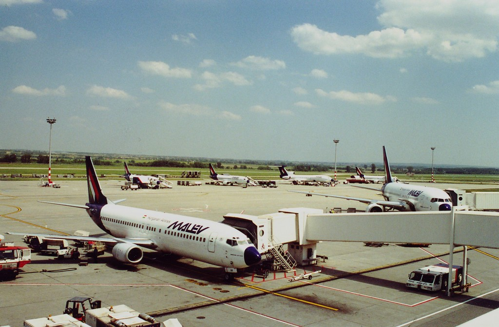 Malév gépek Ferihegyen